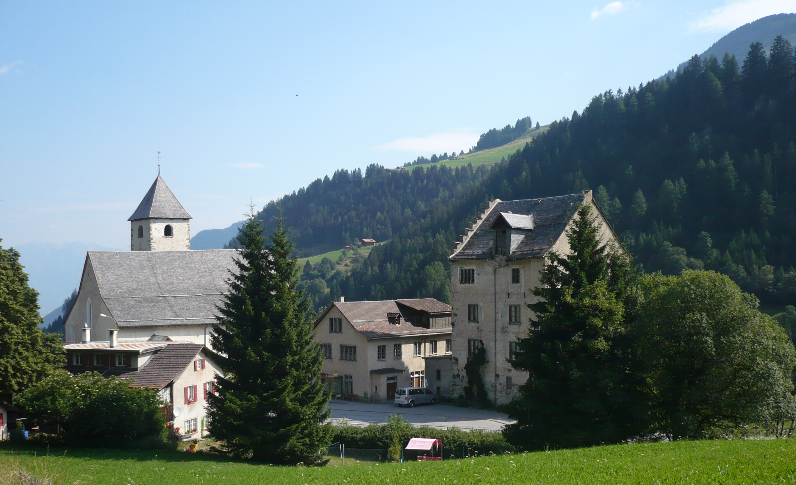 Kirche St. Maria und Michael in Churwalden mit dem ehemaligen Abtgebäude